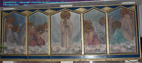 L'eucarestia